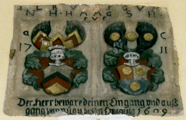 Doppelwappen am Schloss Dörflas (falsche Tinkturen)